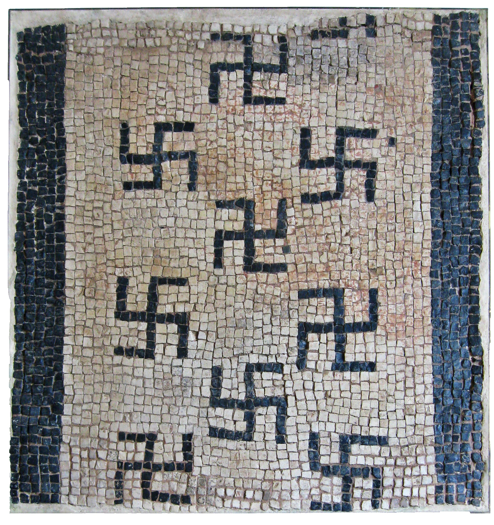 Mosaikboden der "Villa Hylborn" im Pachtener Museum.